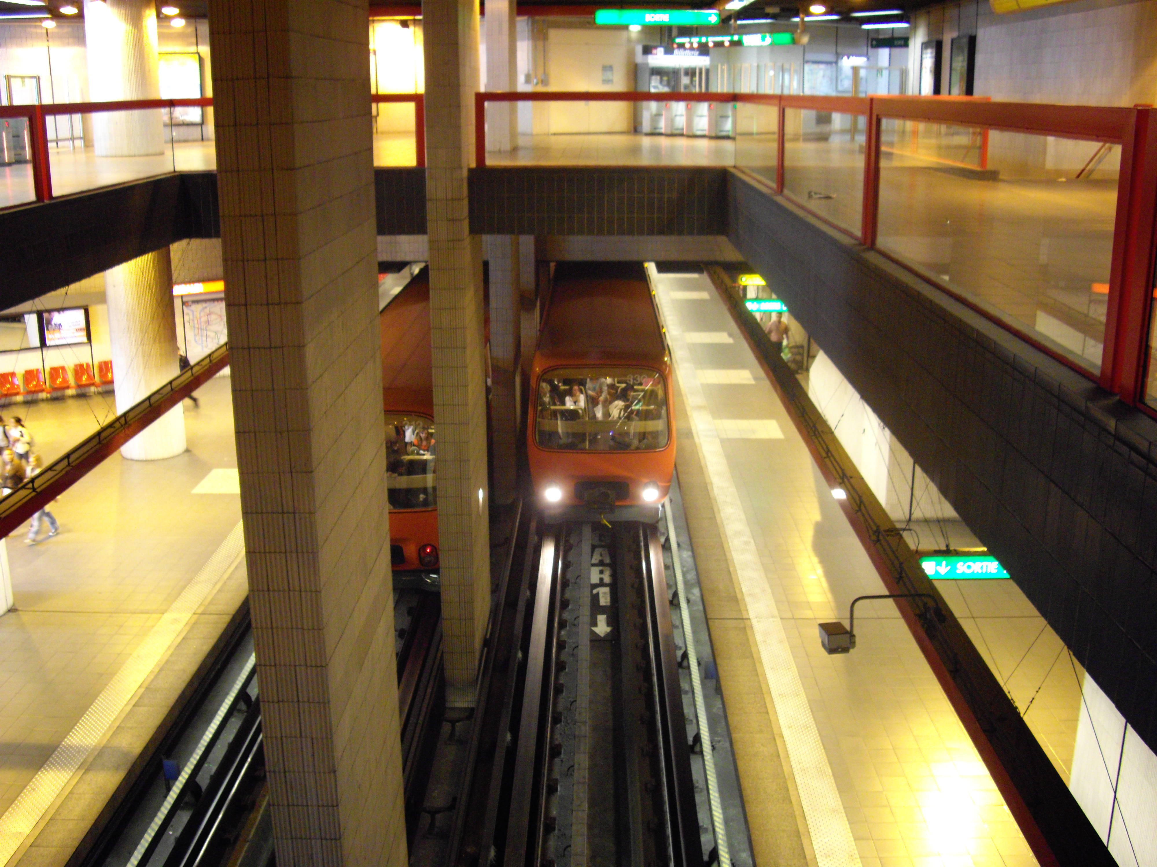 MPL85 - Métro de Lyon Ligne D - Station Garibaldi direction Gare de Vaise à droite, et Gare de Vénissieux à gauche.